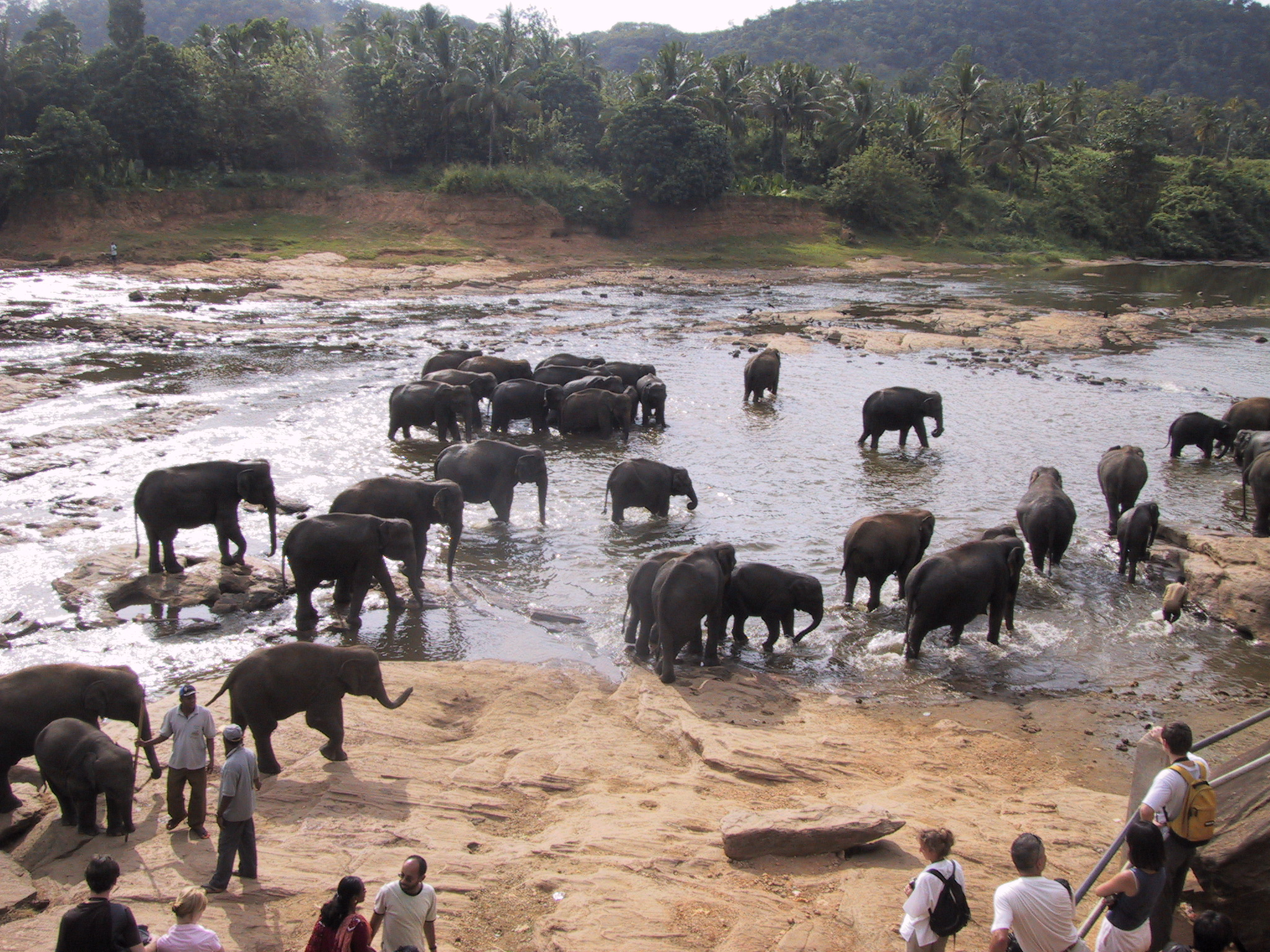 Badende Elefanten im Elefantenwaisenhaus Pinawela, Sri Lanka